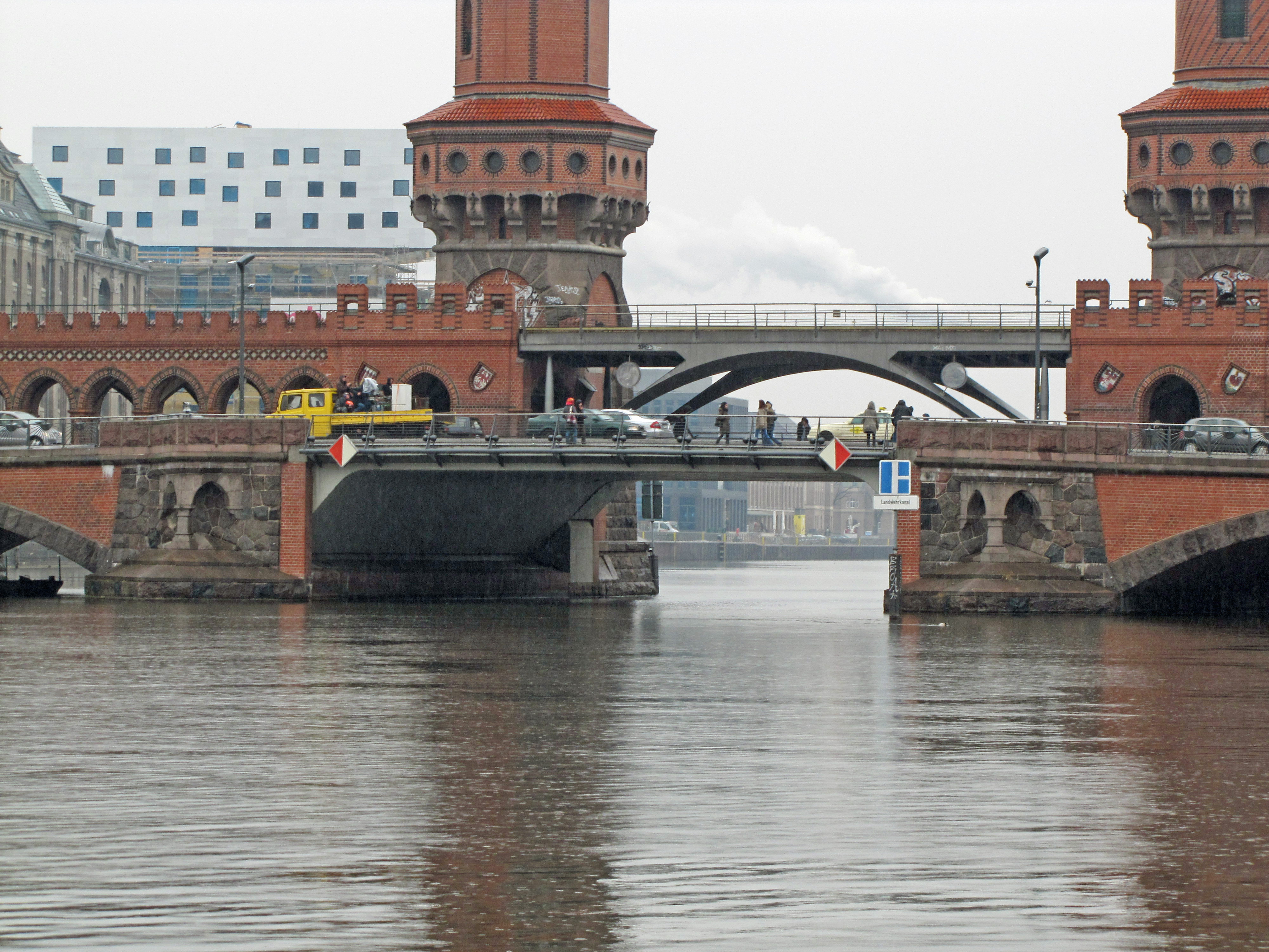 Filmdreh (2010) auf der Oberbaumbruecke in Berlin.